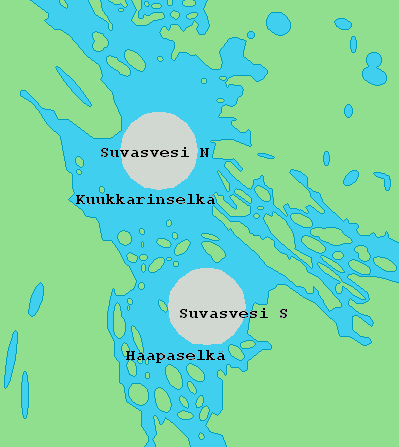 Suvasveden kraatterit * Suvasvesi nedslagskratrar * Lake Suvasvesi impact craters